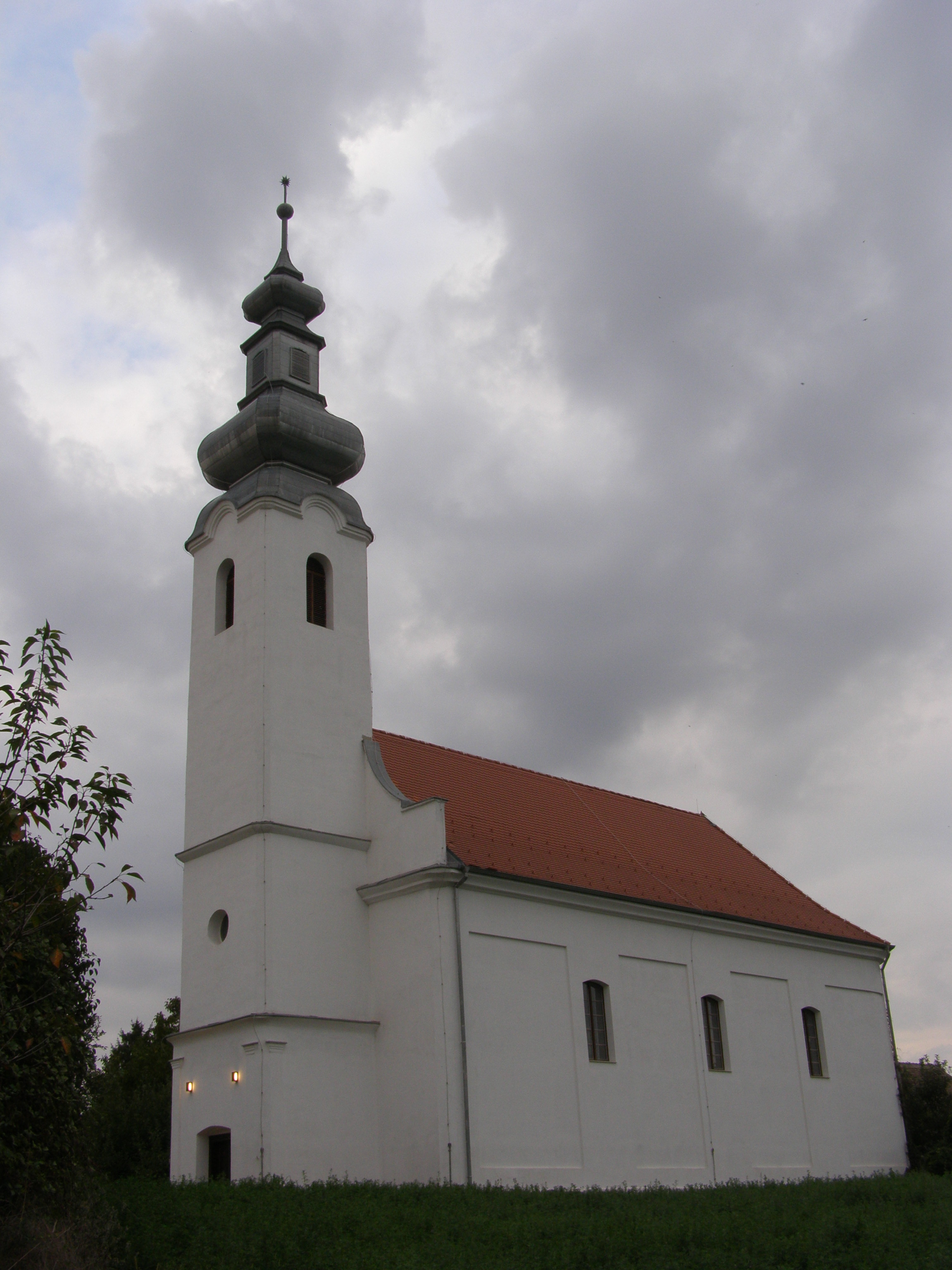 Crkva Bezgrešnog začeća Blažene Djevice Marije, Kralja Tomislava 1, Bilje